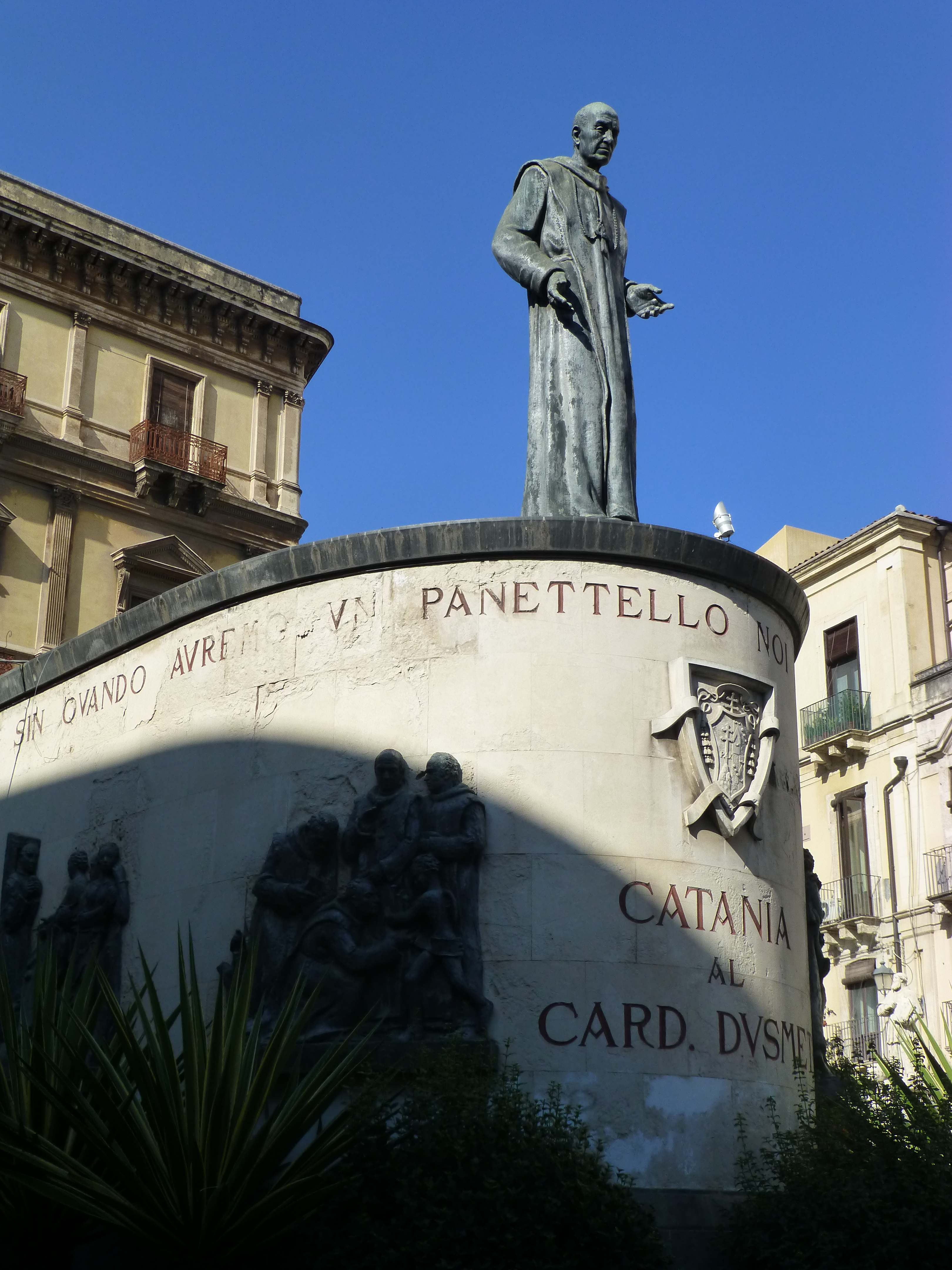 Catania - Giuseppe Benedetto Dusmet - Piazza di San Francesco d'Assisi